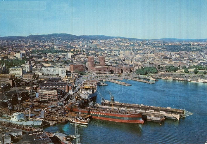 Panoramabilde. Akers mek. Verksted med skip ved Tingvallakaia og under bygging i dokk. Verftskraner. Pipervika, Rådhuset, Rådhusbryggene, nye Vika, vestre del av Akershus festning, Akershusstranda. Postkort.